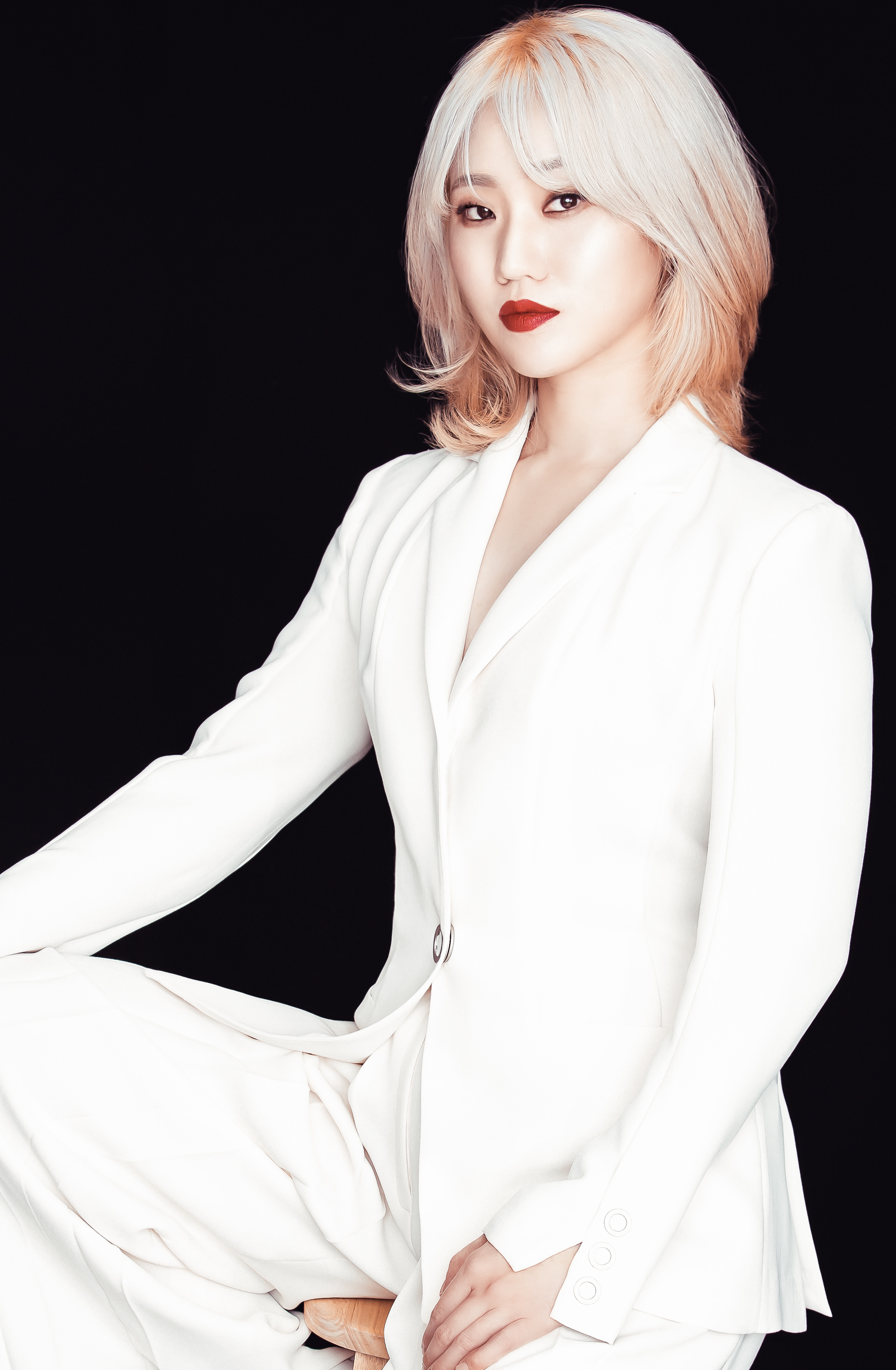 Heosoyoung_jazz_vocalist